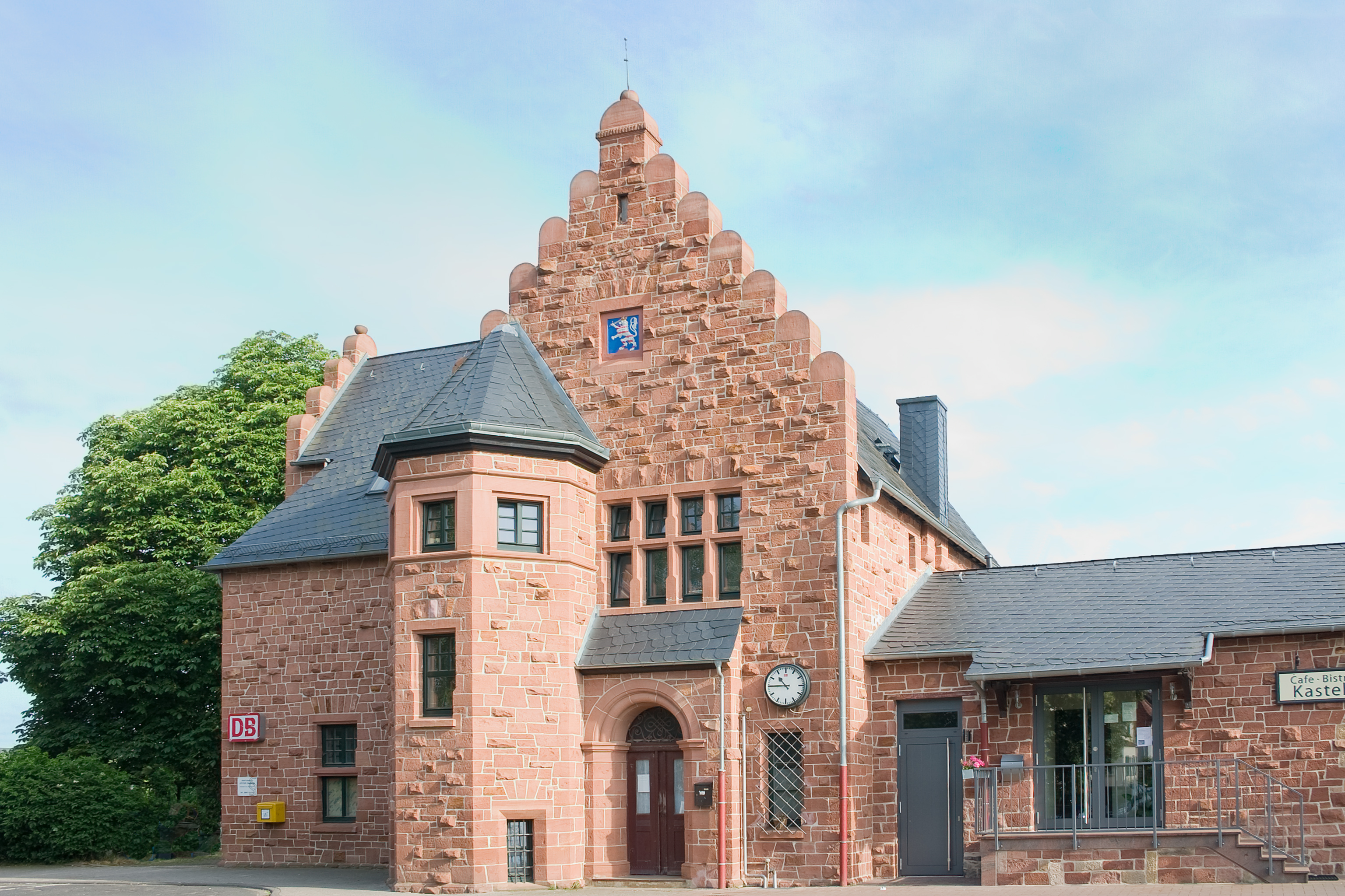 Bahnhof in der Gemeinde Altenstadt, Hessen, in Deutschland.